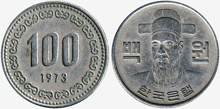 Лі Сунсін на монеті Південної Кореї 100 вон 1973 р.